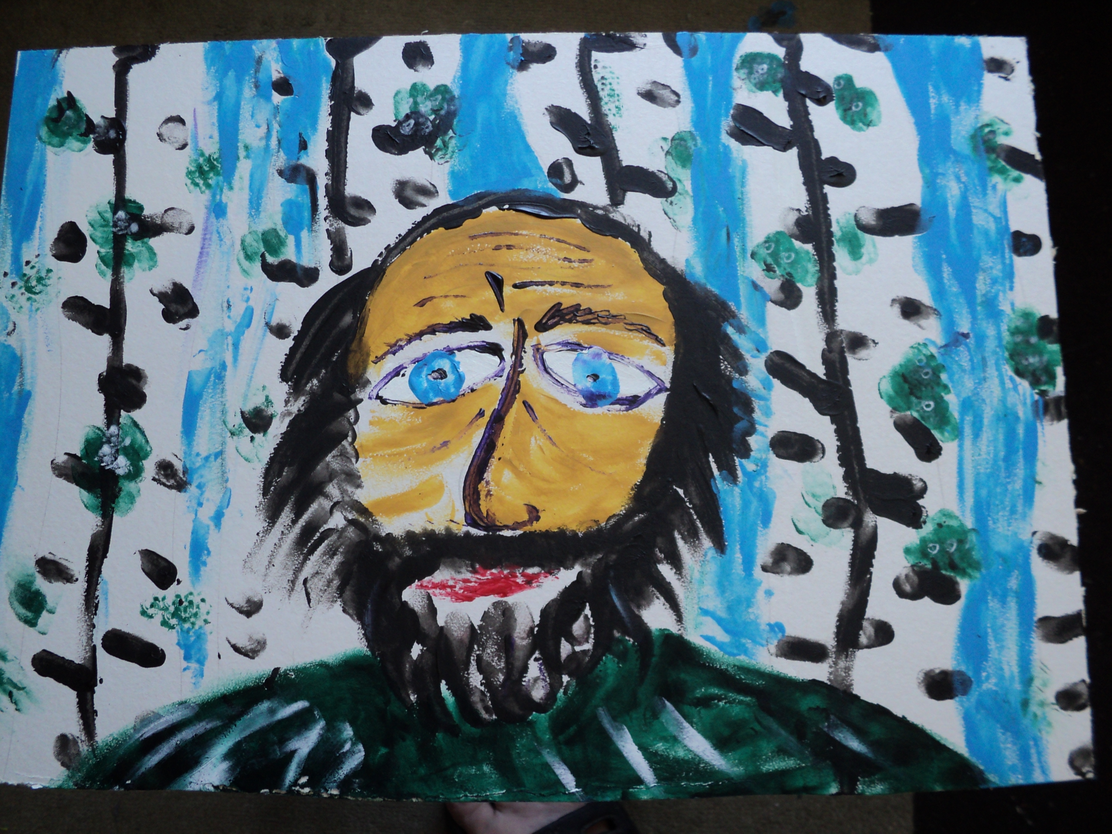 Солженицын. Рисунок Нины Горлановой.